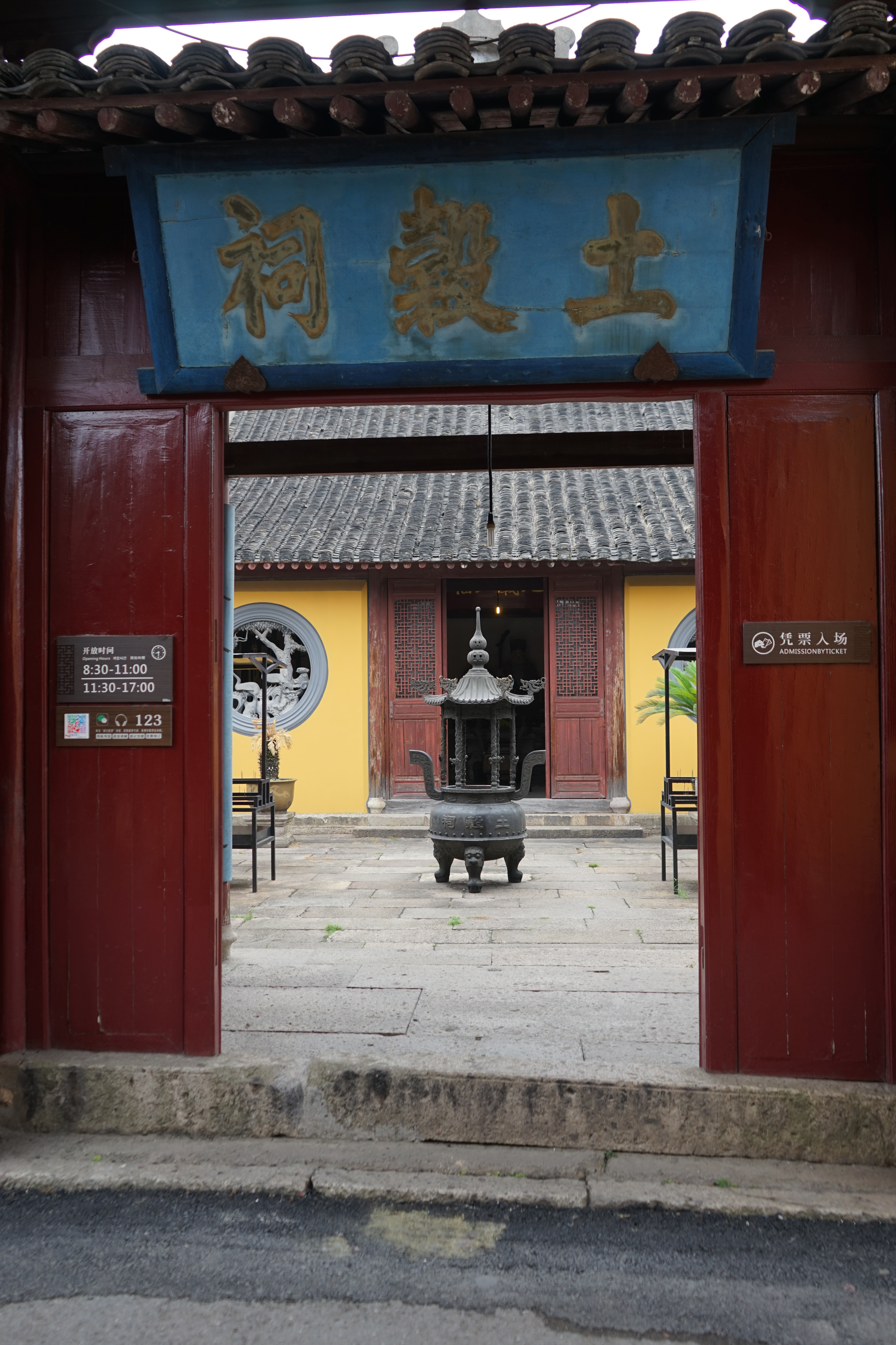 鲁迅故里·土谷祠